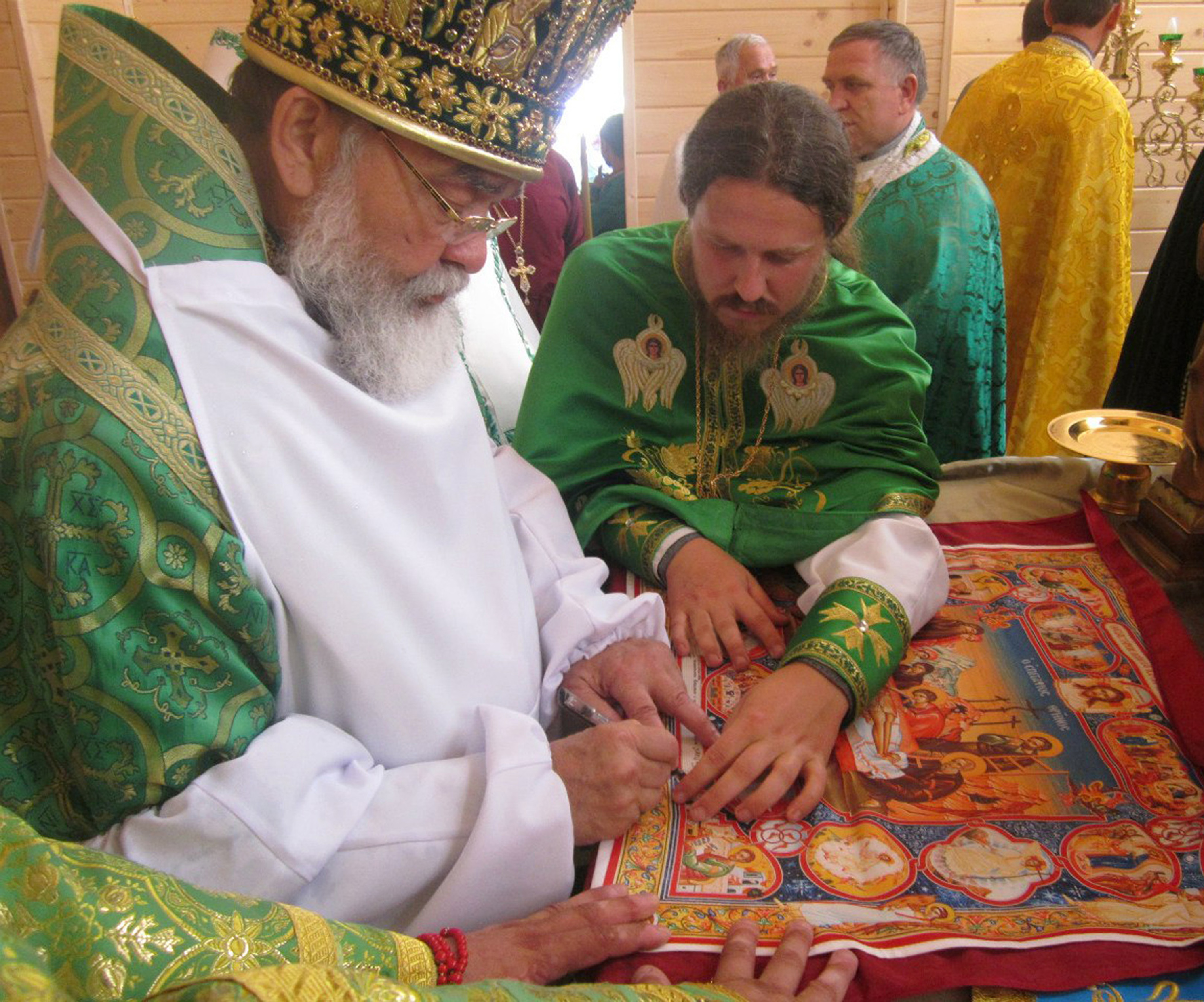 Освячення храму в Свято-Серафимівському скиті, с. Кривець Івано-Франківської обл. 1 серпня 2014 р.